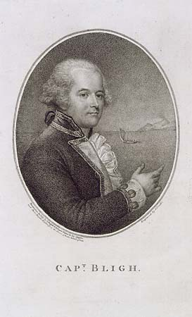 William Bligh (1754-1817), britischer Marineoffizier